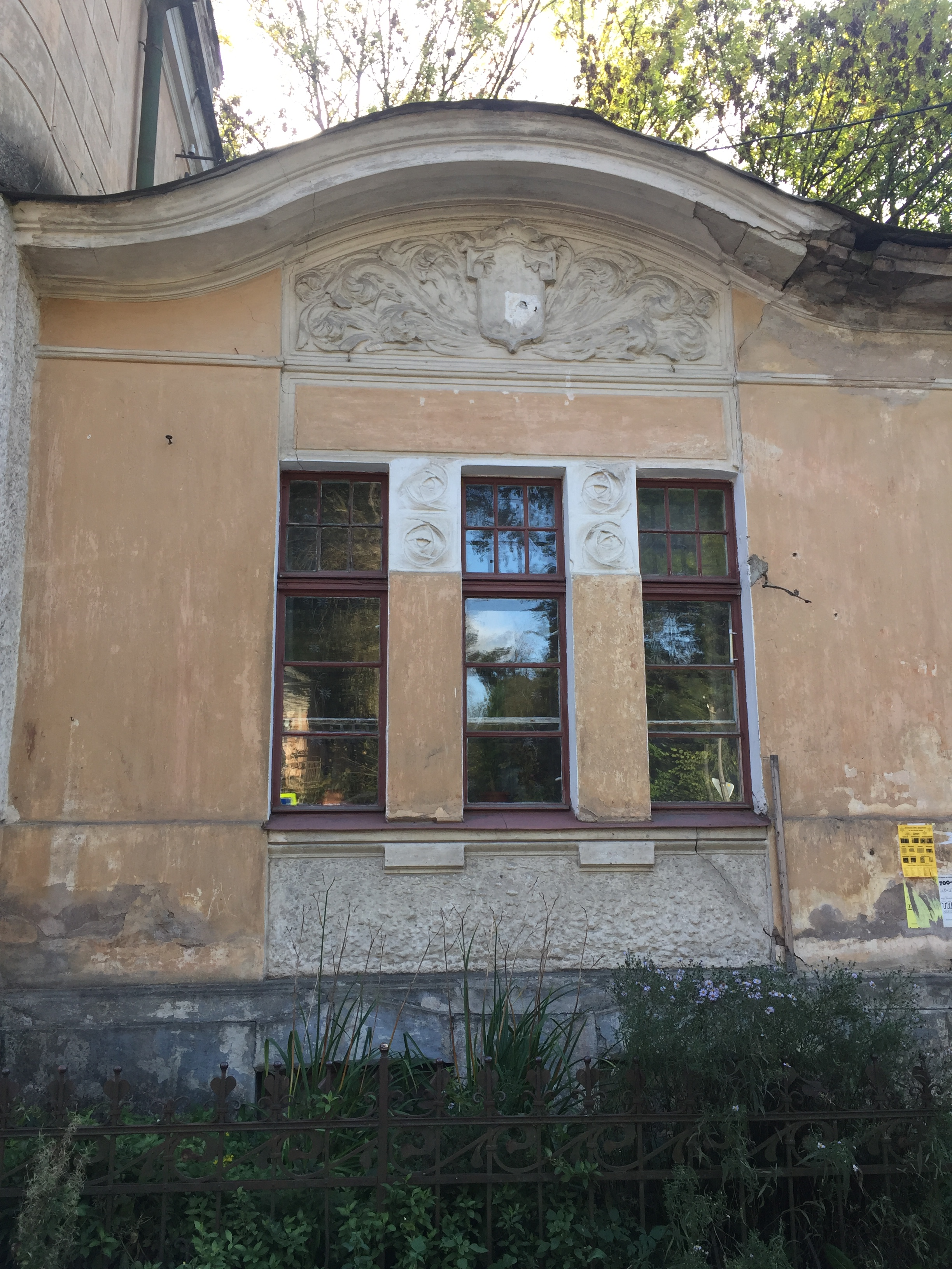 Фабрика канатная Мейера (Дом Мейера, нач.ХХ в.): улица Леона Поземского, 22, Псков, Псковская область